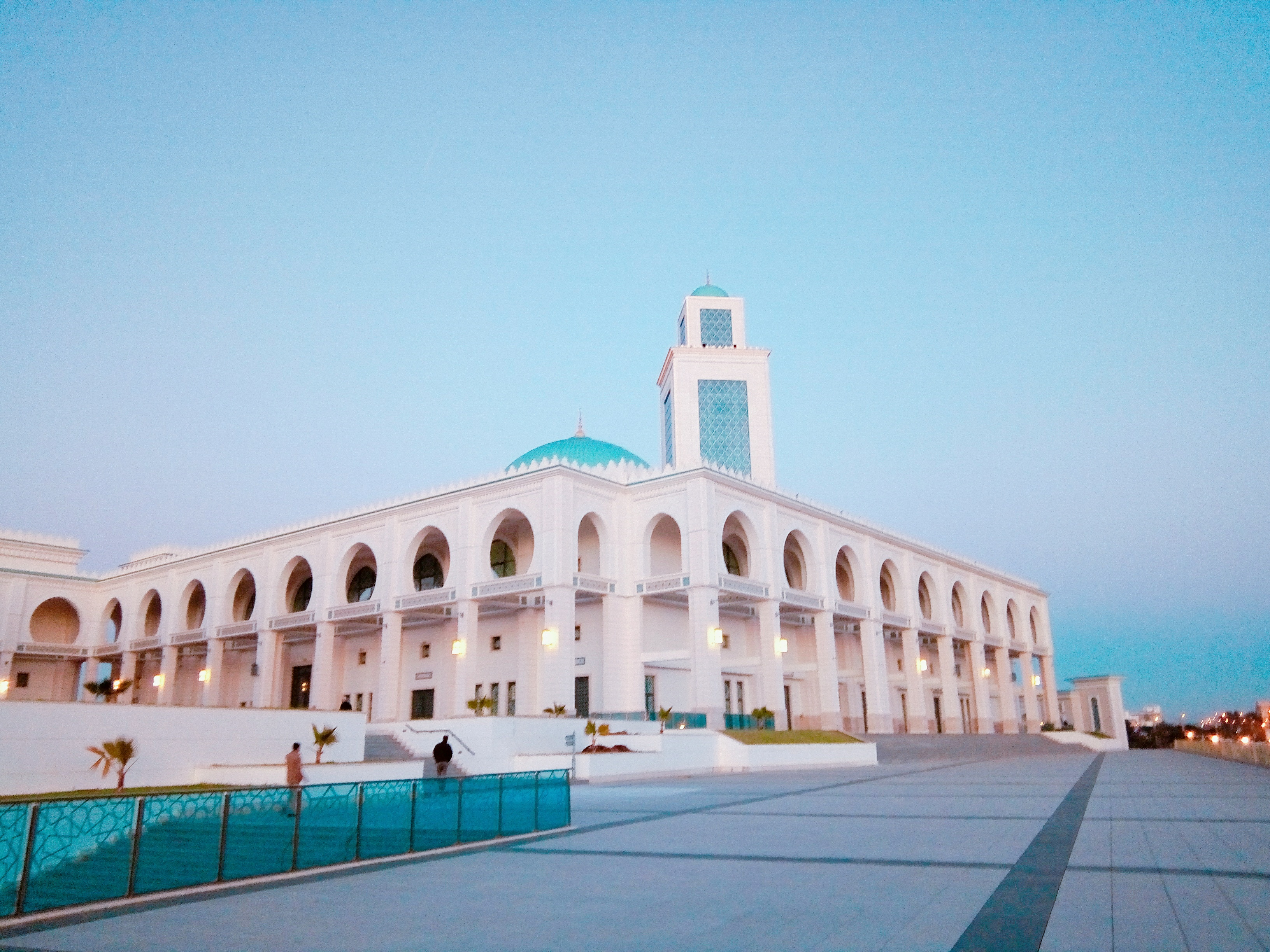 اكبر مسجد بوهران بدولة الجزائر وقت اداء صلاة المغرب يتواجد بالطابق الارضي مكتبات دينية ومكتبات اخرى